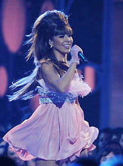 Gloria Trevi en la alfombra de Premios Juventud 2008